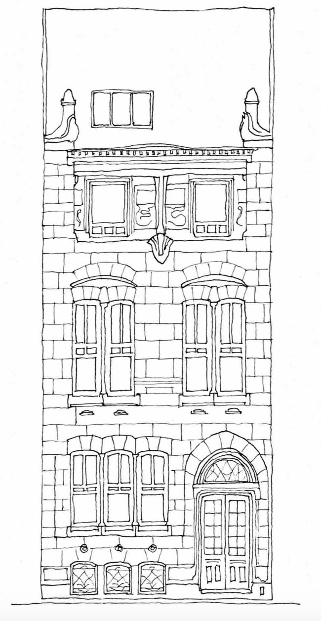 Dessin de la façade de la maison Autrique